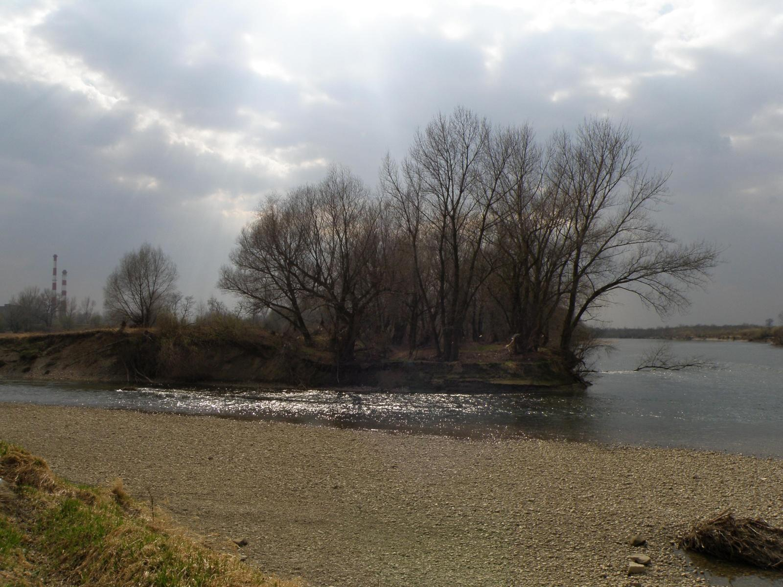 Ujście rzeki Białej do Dunajca. Z lewej strony w oddali widać kominy Zakładów Azotowych w Tarnowie S.A.